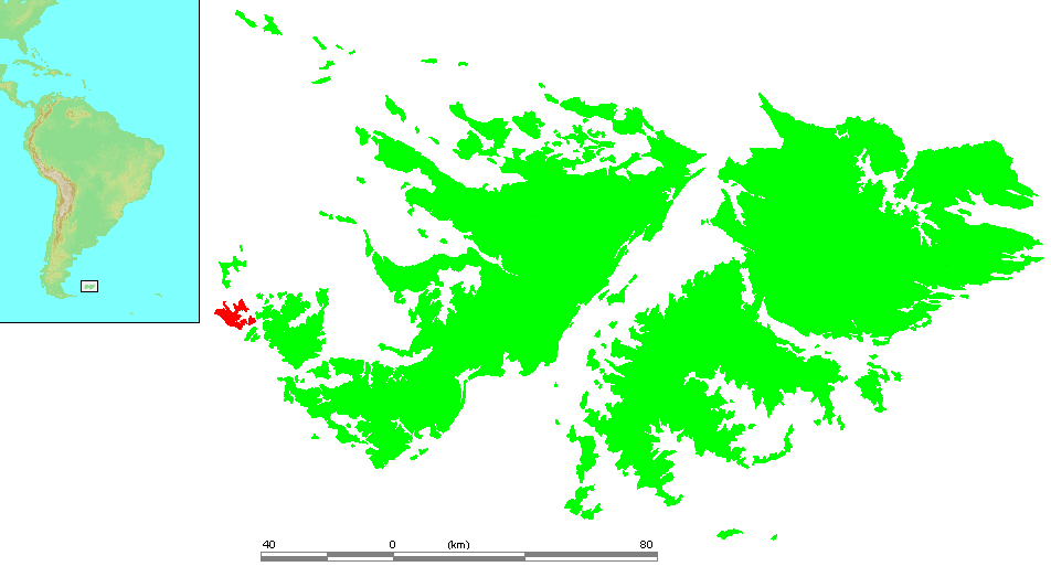 Falkland Islands - Beaver Island.PNG